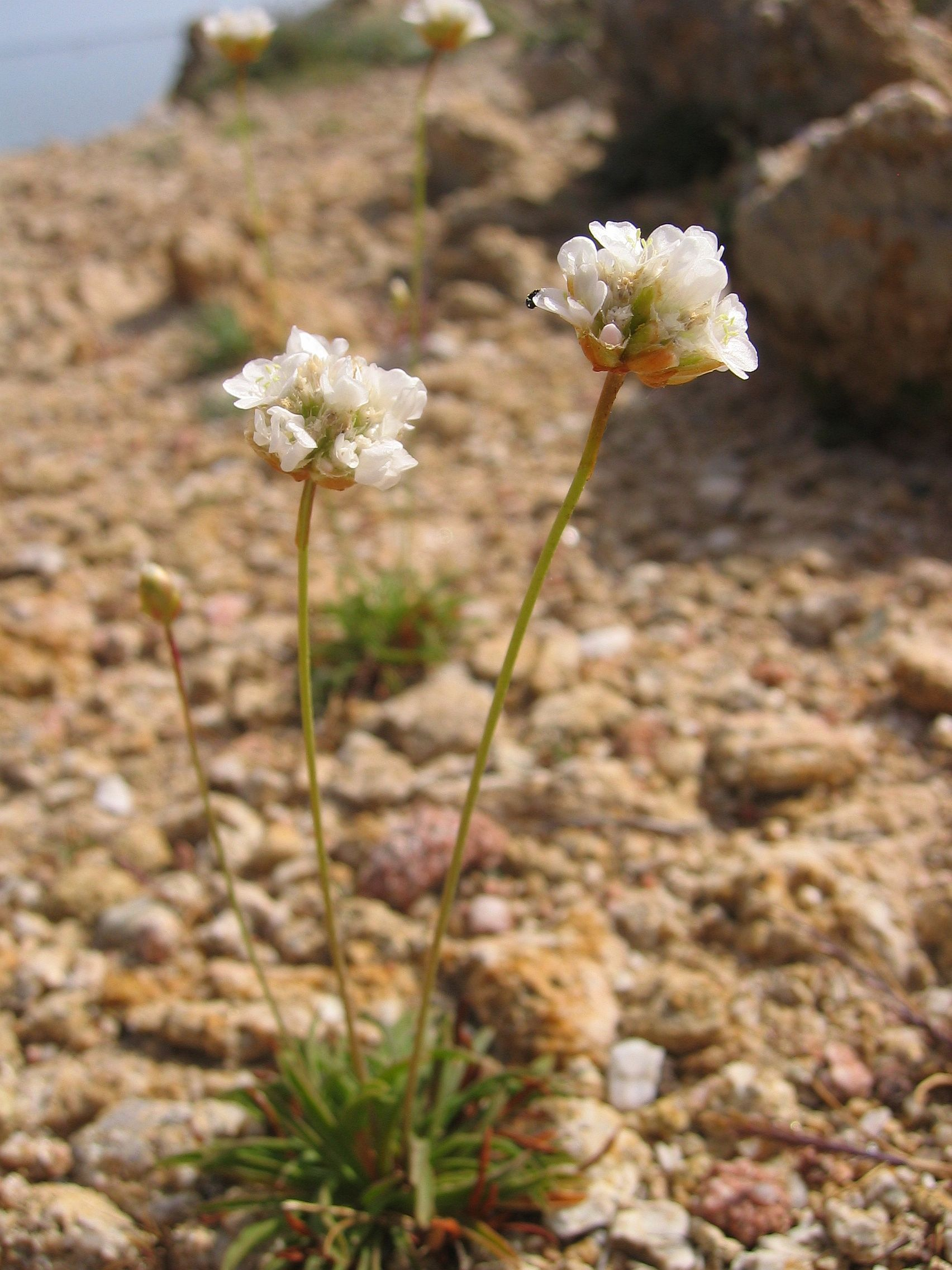 Armeria soleirolii La Revellata, Corse, France